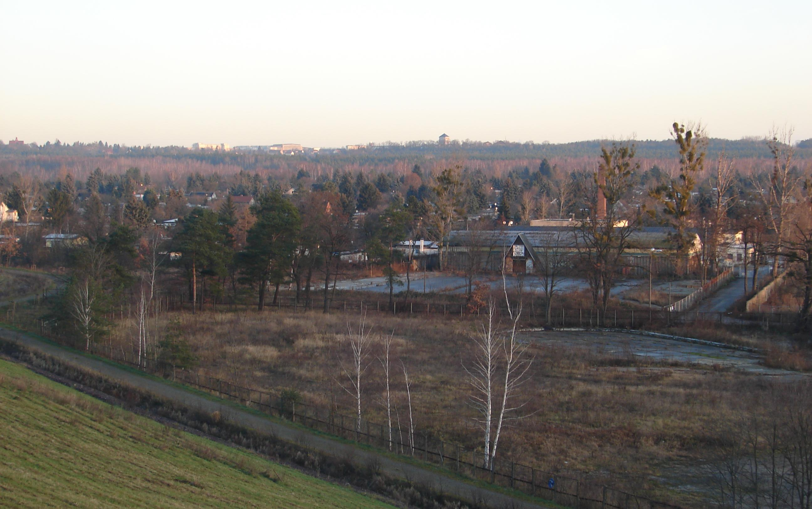 Blick von der begrünten ehemaligen Halde am Proschhübel nach Norden auf die Hellersiedlung, der größten Kleingartenanlage Deutschlands. Hier befand sich in den Jahren um 1930 der historisch zweite Dresdner Verkehrsflughafen.